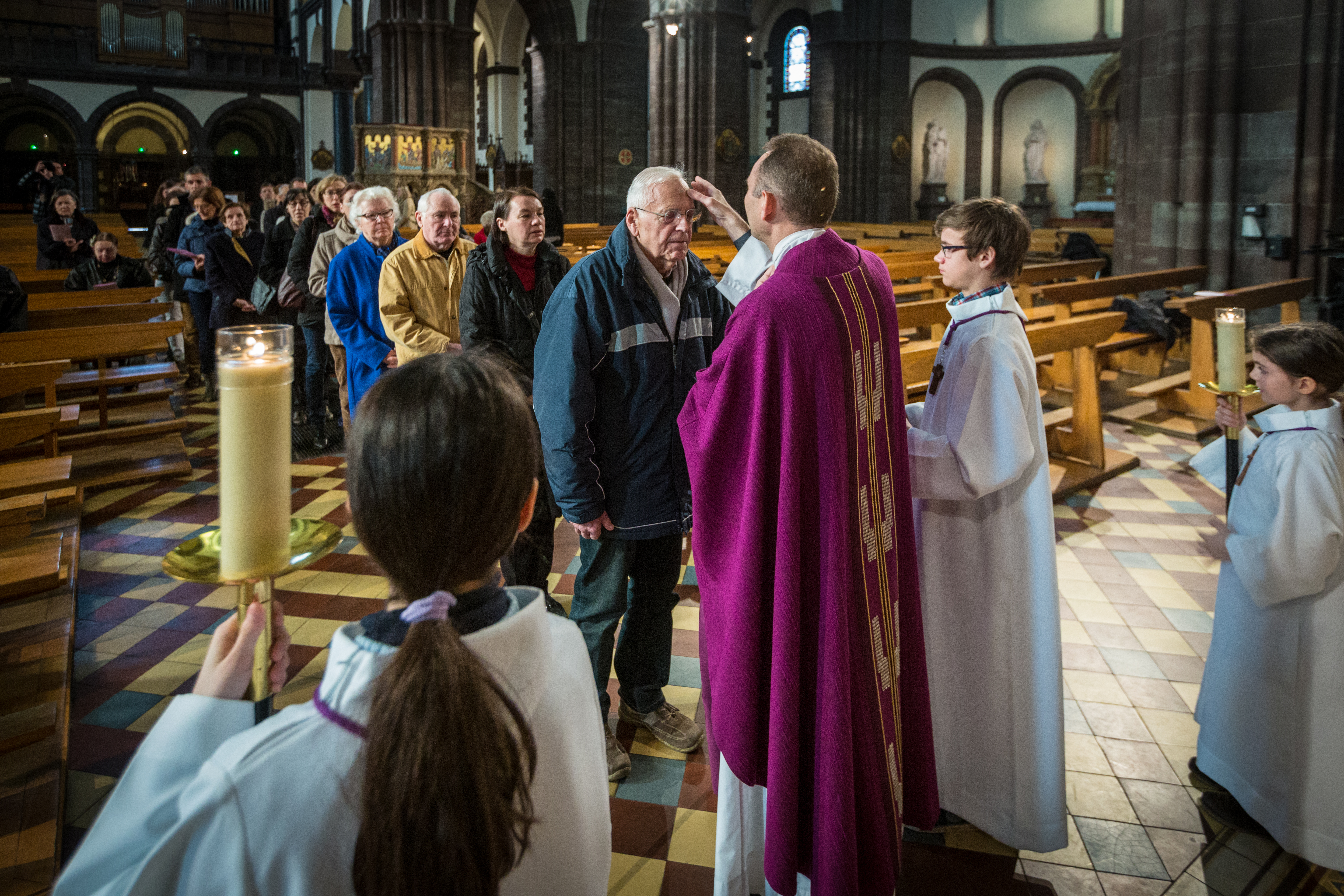 Messe des Cendres Saint-Pierre-le-Jeune Strasbourg 5 mars 2014